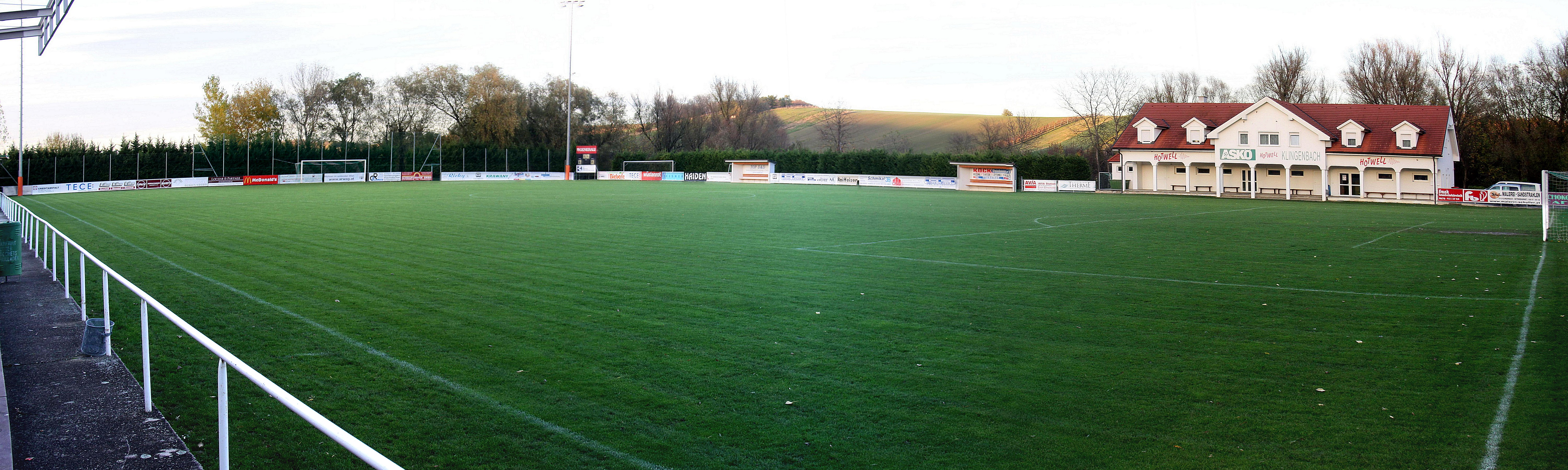 Grenzstadion des ASKÖ Klingenbach (Panoramafoto, zusammengesetzt aus 3 Einzelbildern).